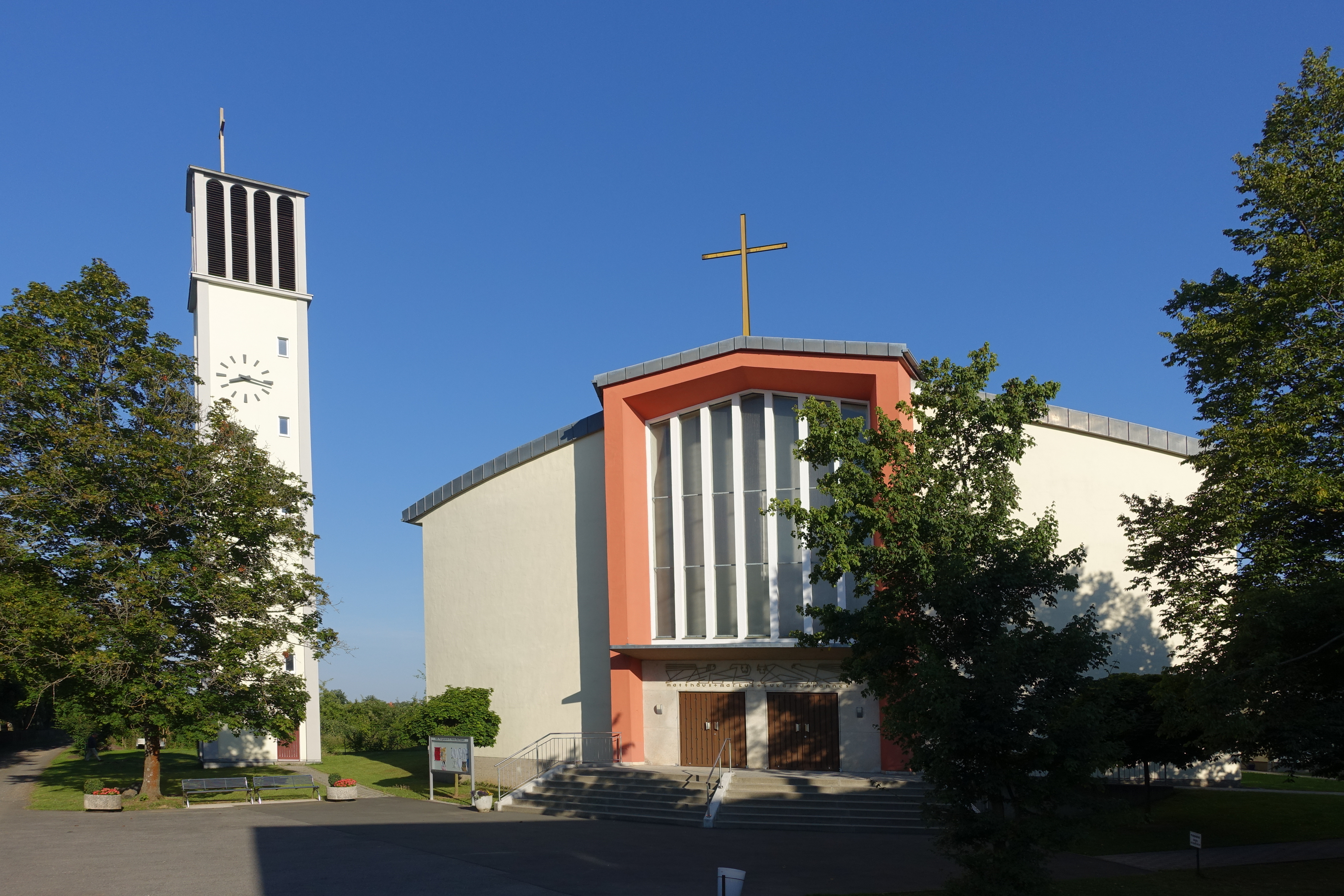 Blick auf Kirche und Campanile